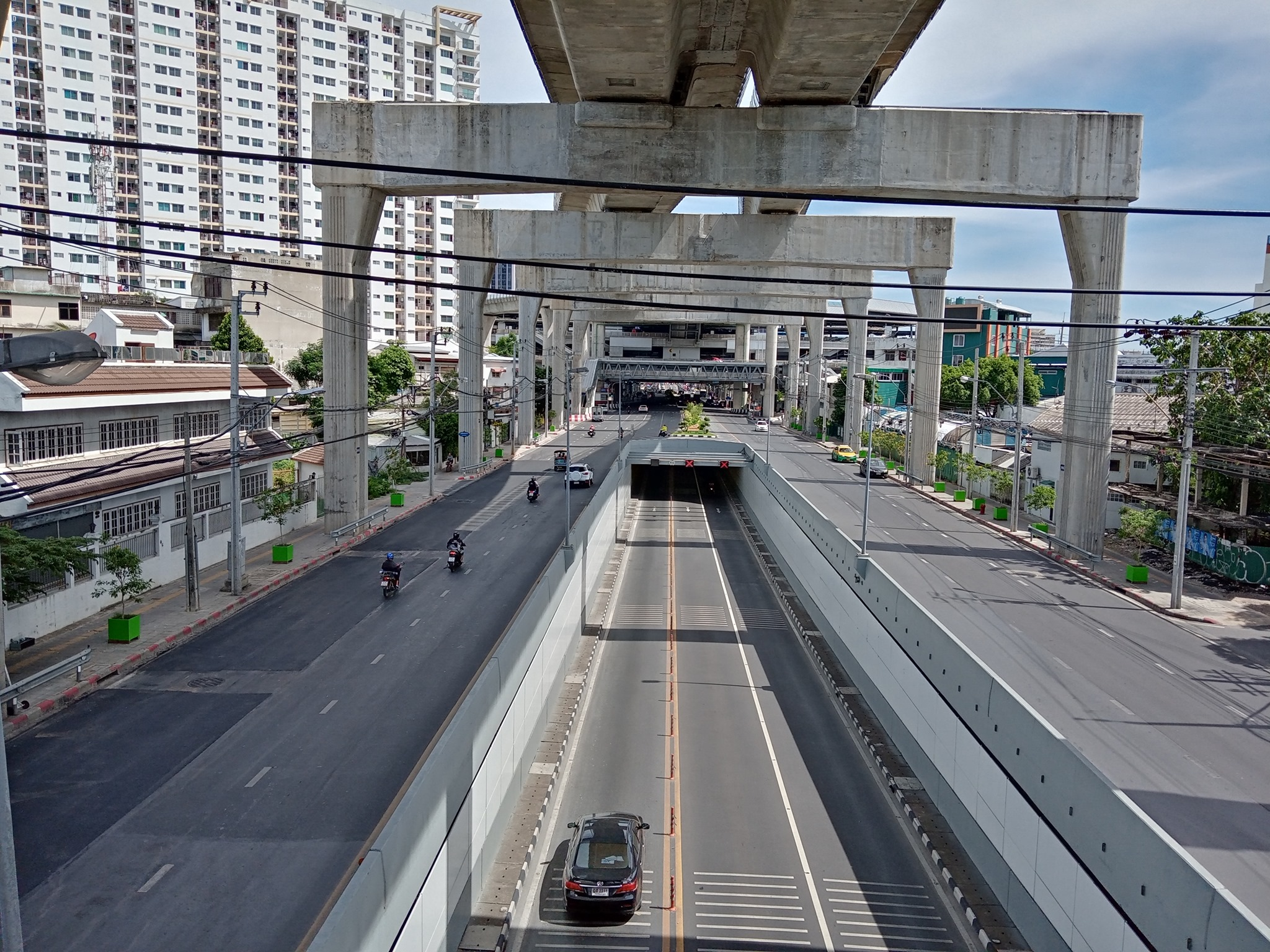 สี่แยกท่าพระ แขวงวัดท่าพระ เขตบางกอกใหญ่